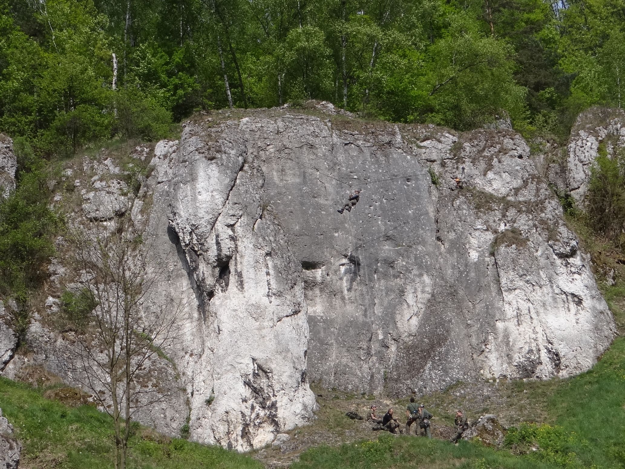 Szara Płyta w Dolinie Kobylańskiej